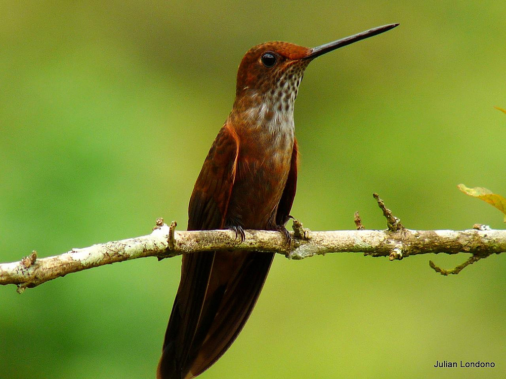 Tomada en Aralcal, "El Bosque Cafetero". Manizales, Colombia. Escuche el canto y vea el mapa de distribución de ésta especie aquí: Le recomiendo éstas fotos de los Colibríes de Aralcal: [1]SELECTED HUMMINGBIRDS Disfrute con más fotos de las Aves de Aralcal